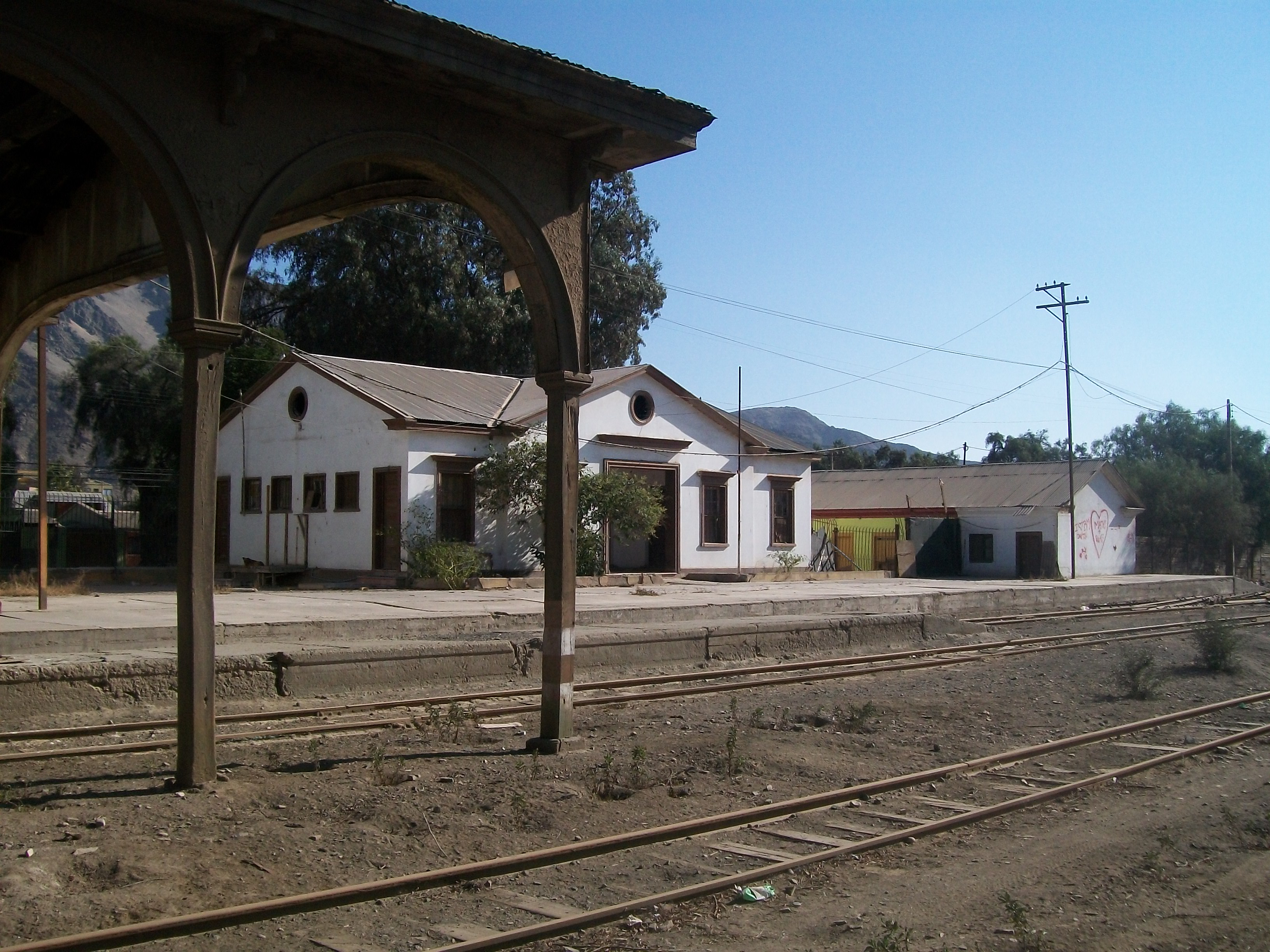 Interior de la estación de Ferrocarriles de Copiapó. Su extensión comprende aproximadamente desde la Alameda M.A. Matta hasta la calle R. J. Peña. Las calles que la rodean paralelamente son Lautaro (Oriente) y Avenida Juan Martínez (Poniente). This is a photo of a national monument in Chile: 560